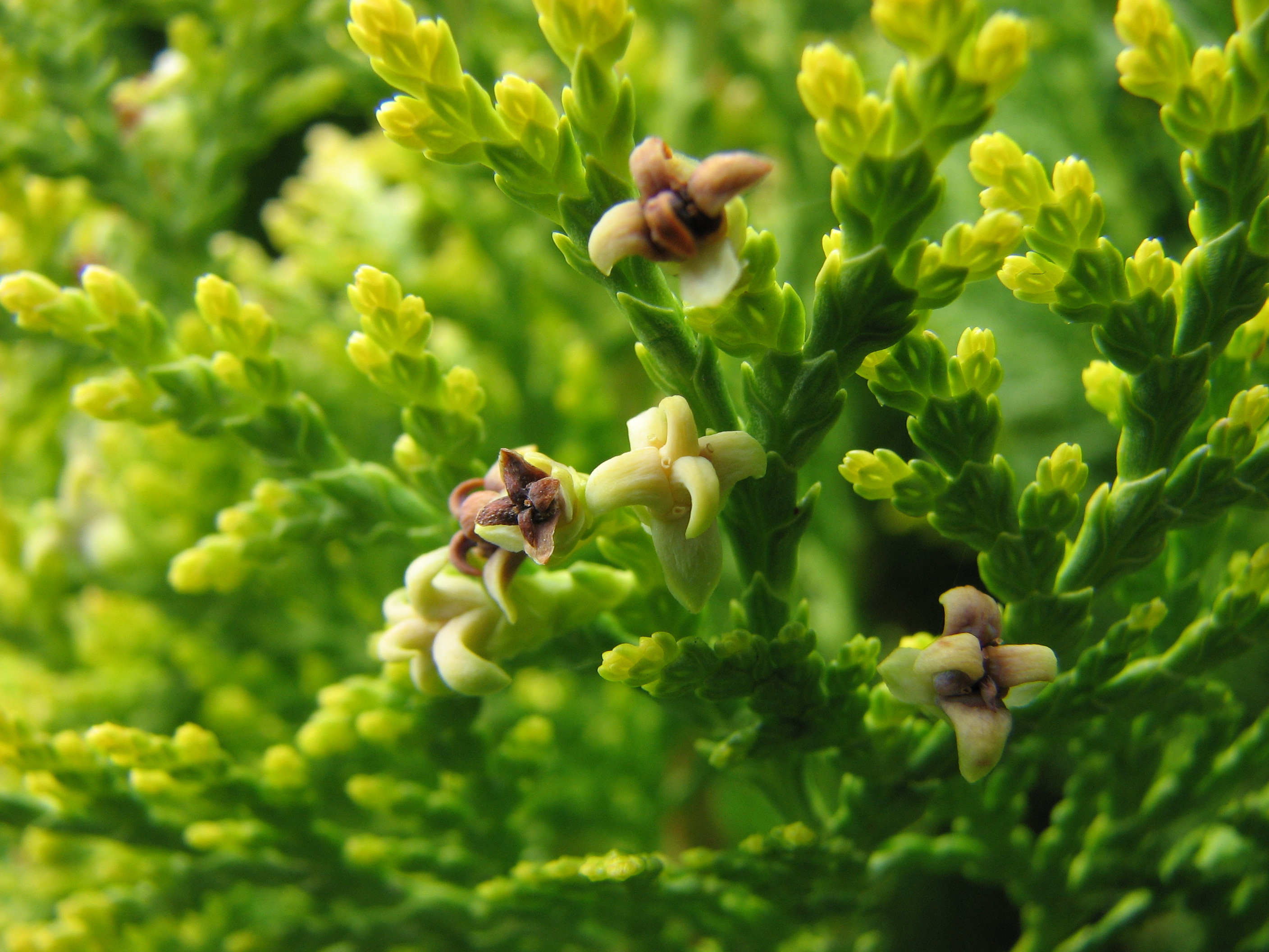 Platycladus orientalis immature cones.